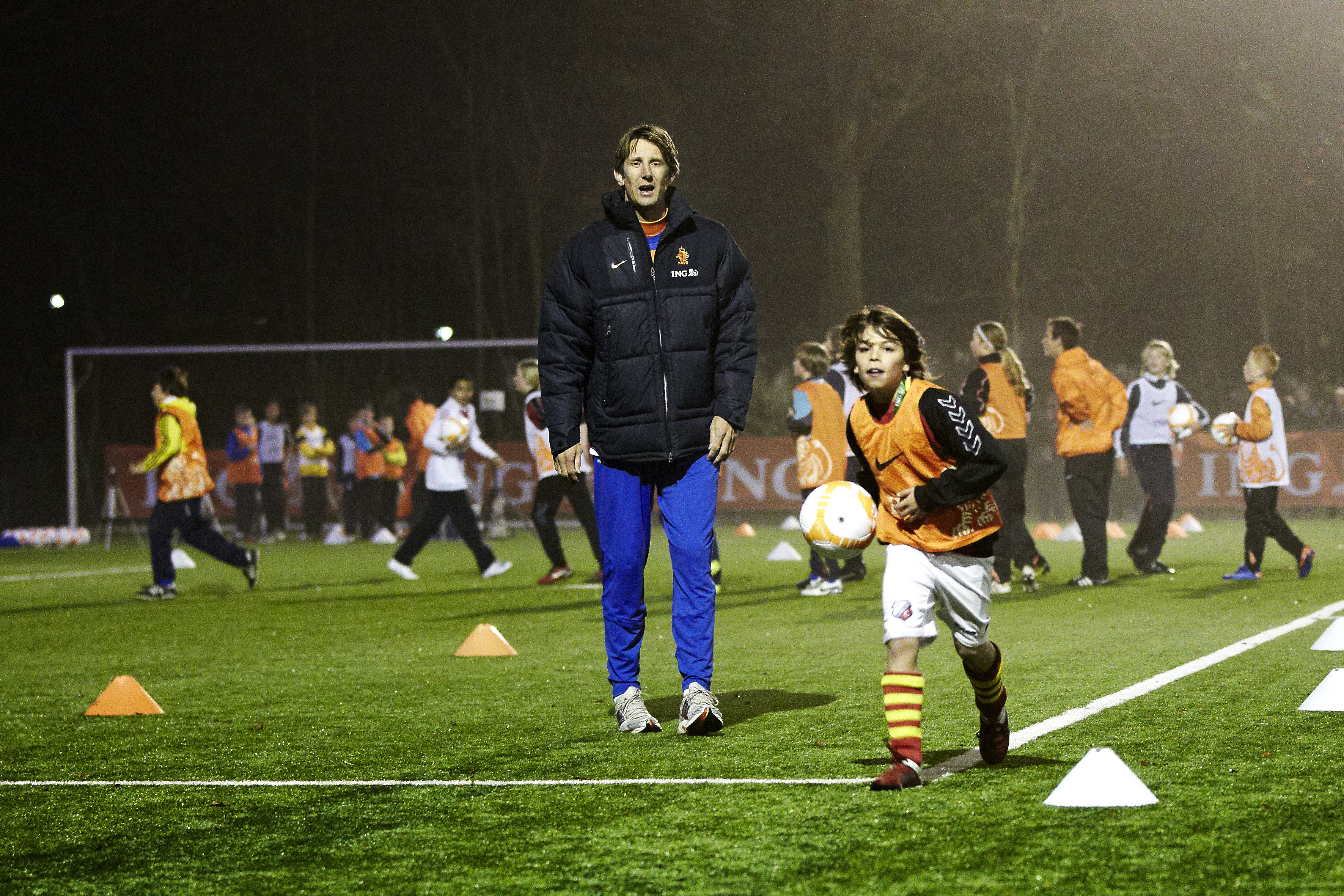 Edwin van der Sar